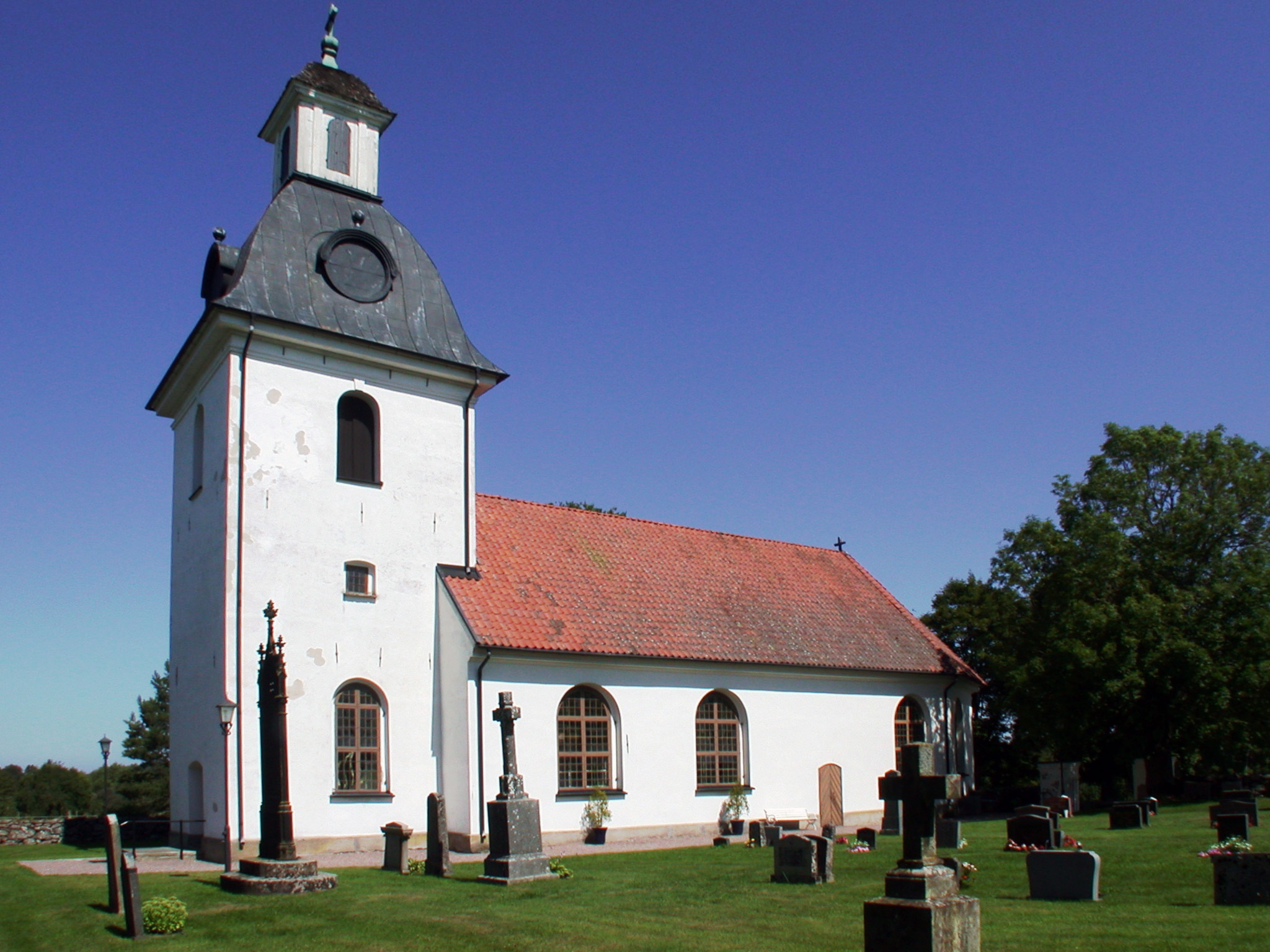 Enåsa church, Mariestad, Sweden